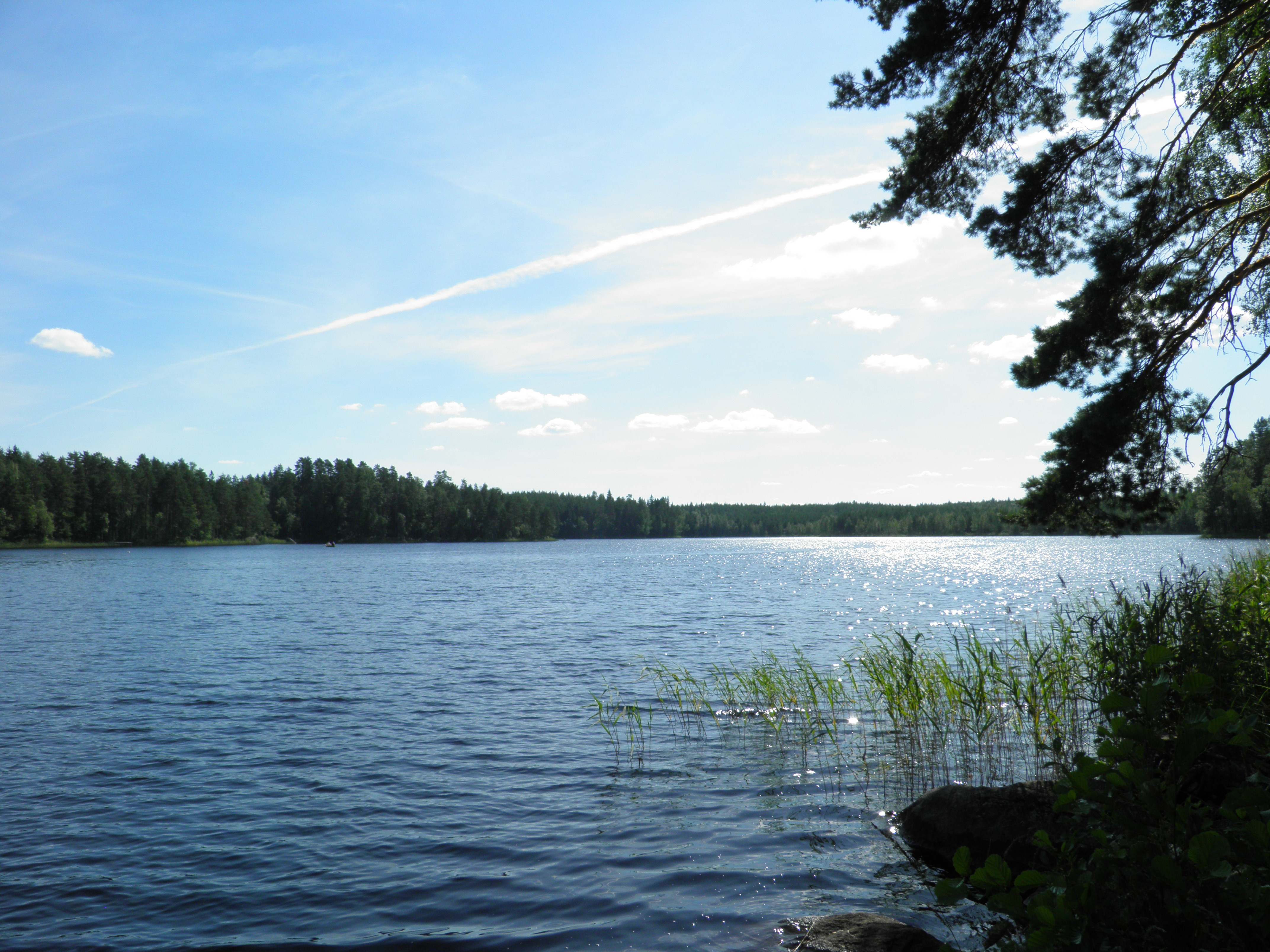 Alinen Niemisjärvi Hämeenlinnan Evolla pohjoisesta nähtynä.